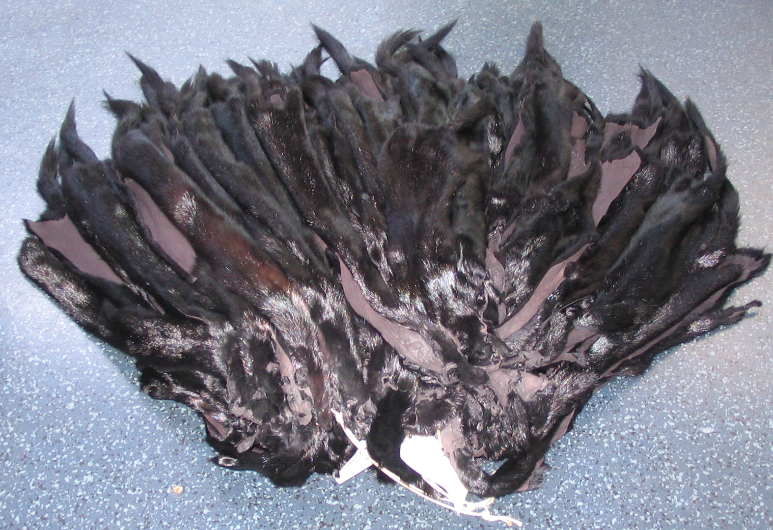 schwarzgefärbte, nordamerikanische Hermelinfelle, Kürschnersortiment